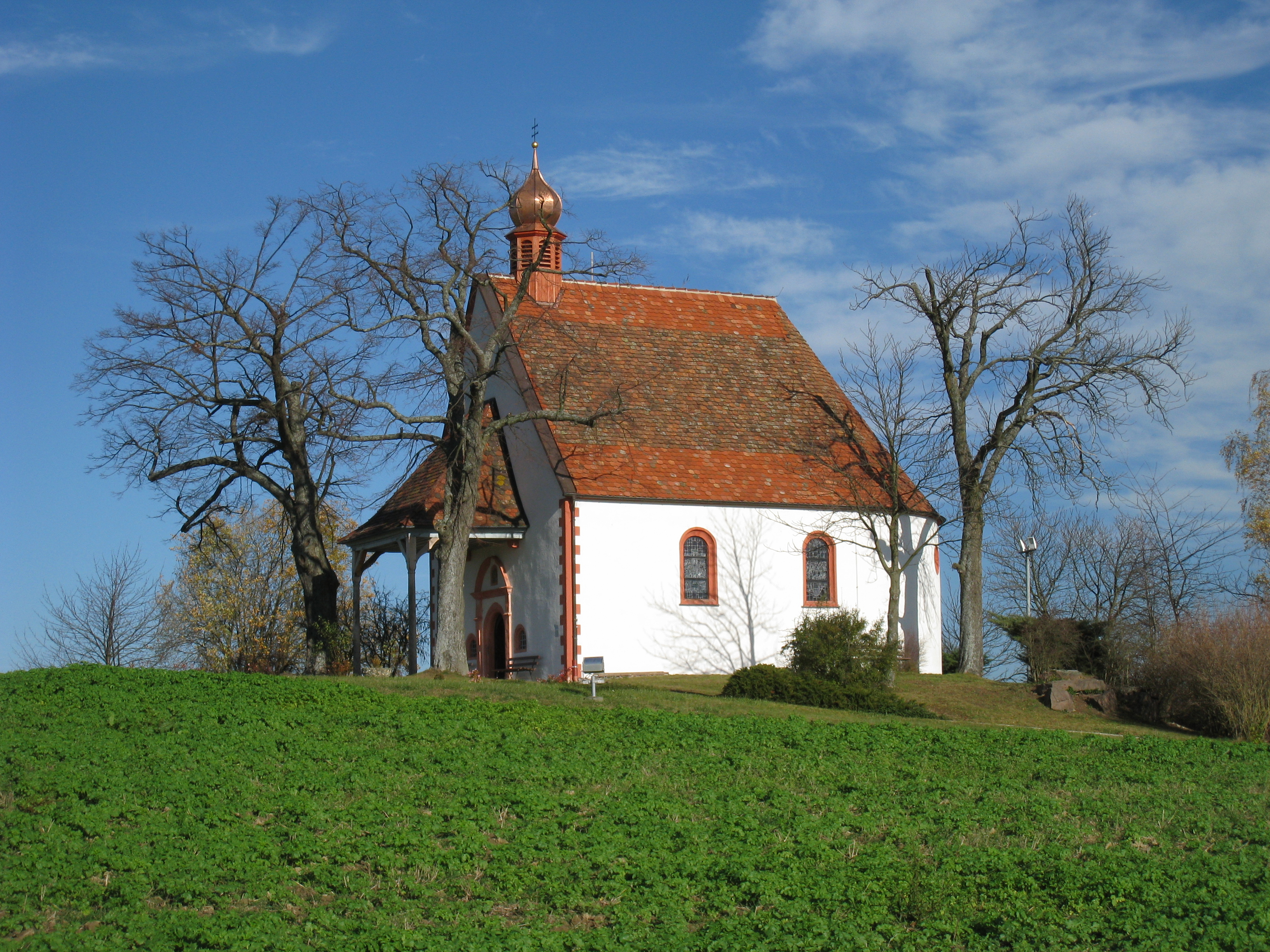 Die Kapelle hat nach der Renovierung ein Zwiebeltürmchen.